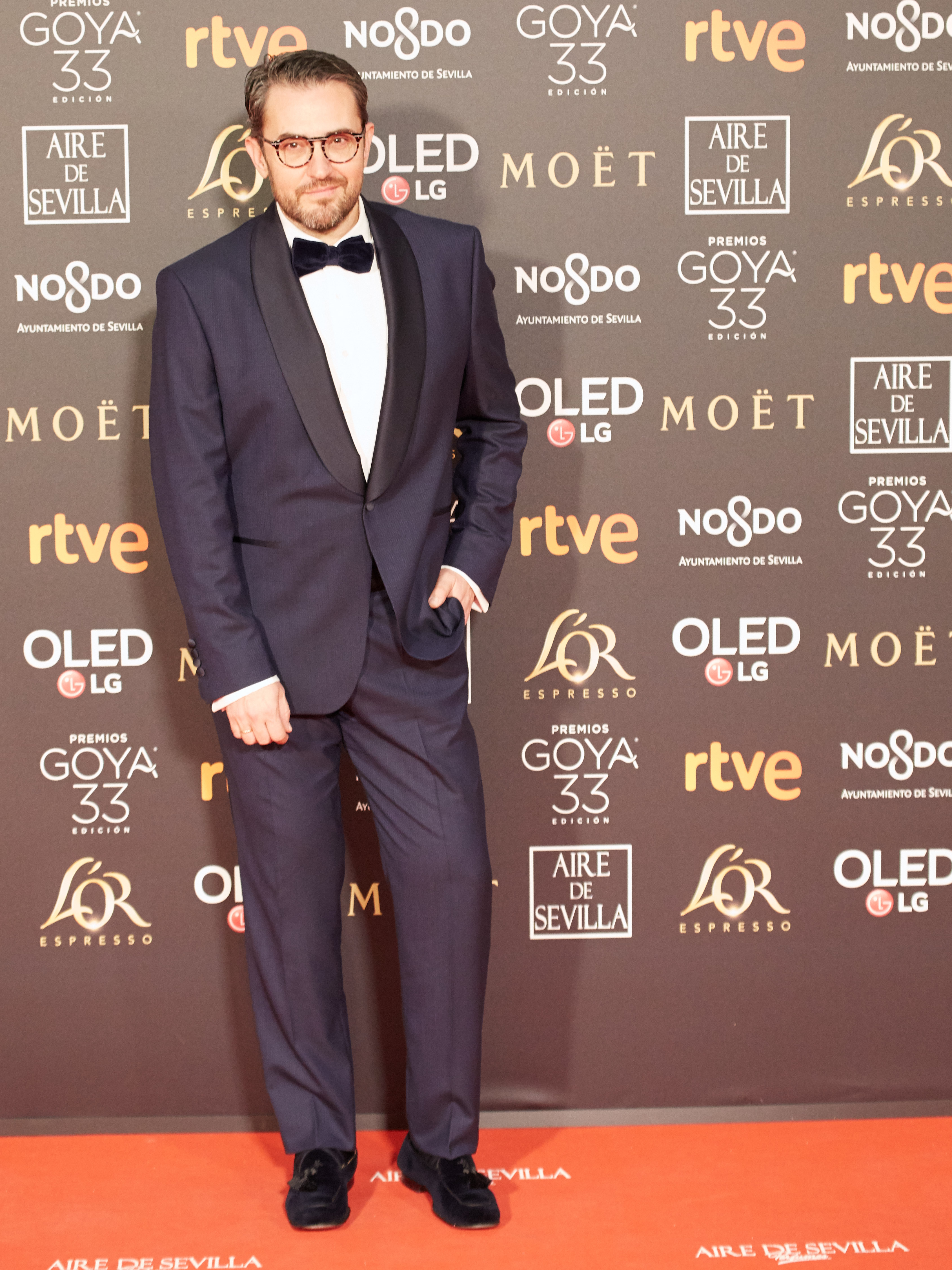 Maxim Huerta en la alfombra roja de los Premios Goya celebrados en Sevilla en Febrero 2019